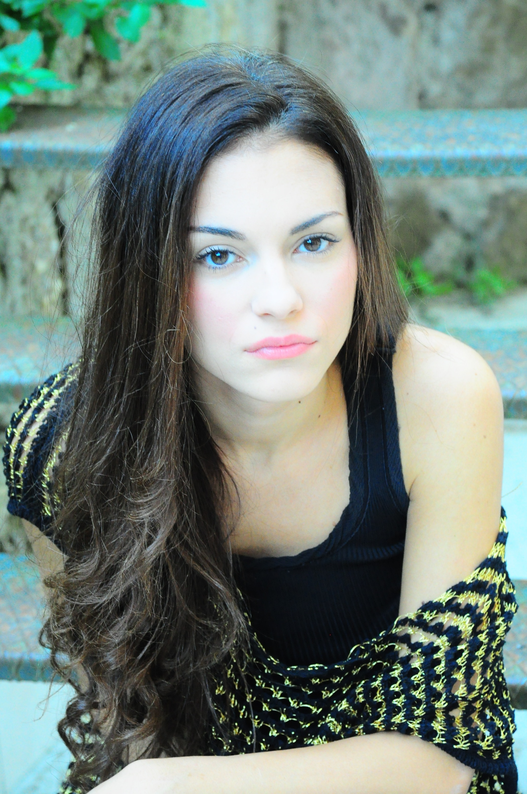 primo piano di Lavinia Guglielman